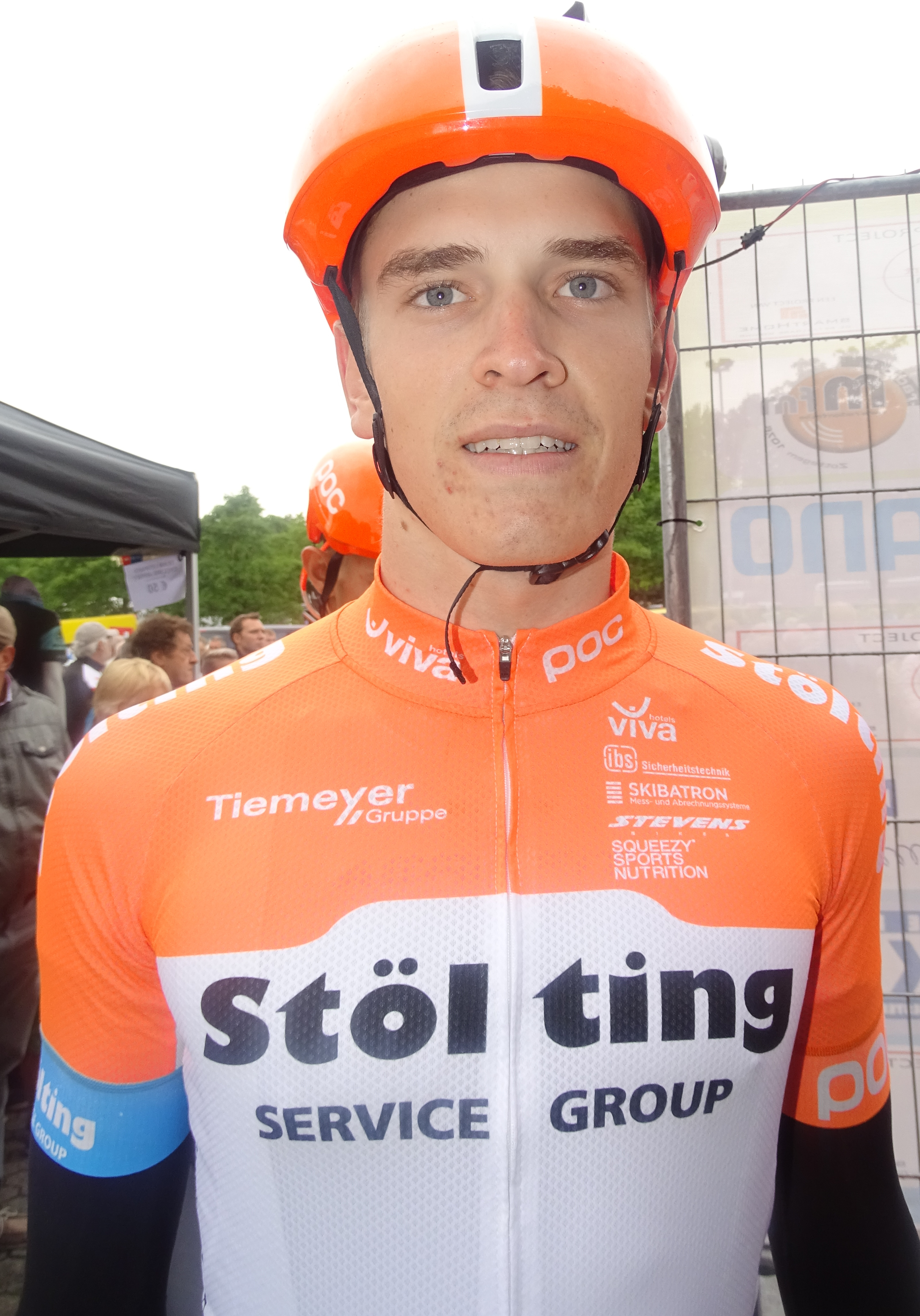 Reportage réalisé le mardi 18 août à l'occasion du départ et de l'arrivée du Grand Prix de la ville de Zottegem 2015 à Zottegem, Belgique.